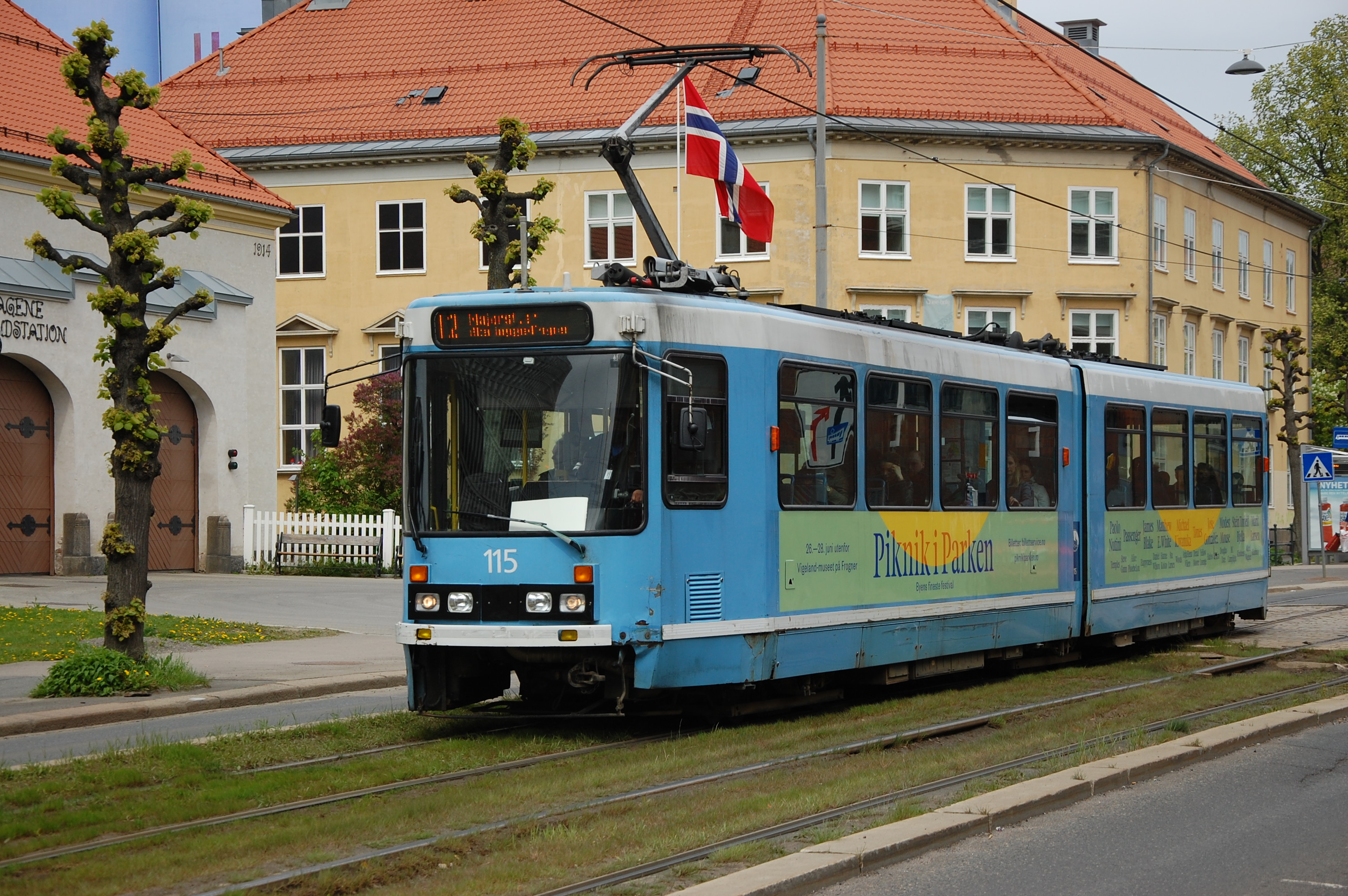 Sandaker senter holdeplass ved Sandaker senter, Sandakerveien i Oslo. Trikk 12 Majorstuen kjører ut fra holdeplassen